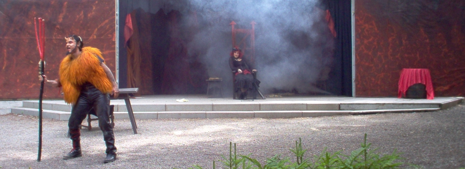 Szene aus "Der Teufel mit den drei goldenen Haaren", Waldbühne Sigmaringendorf, Spielzeit 2008